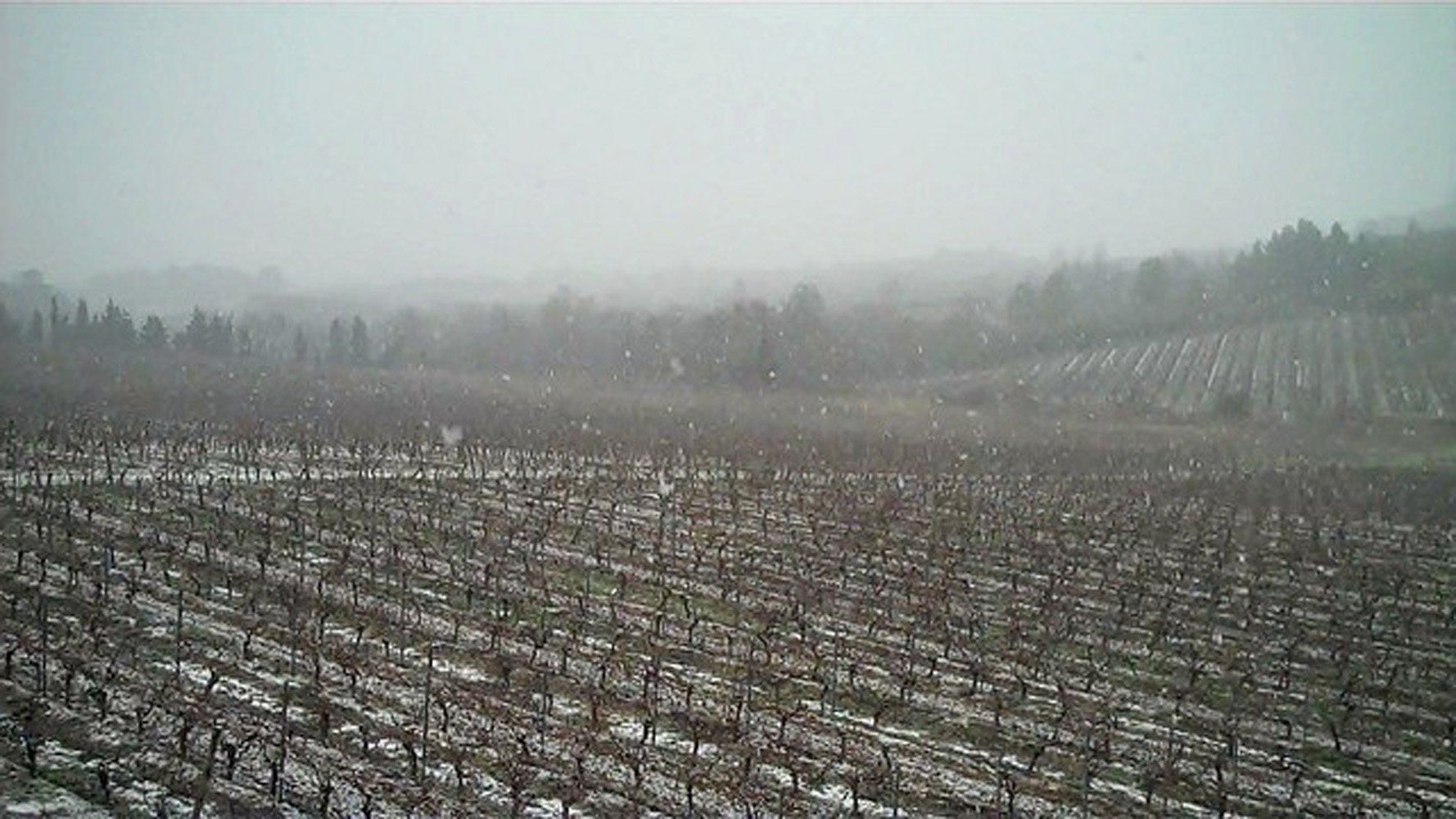 Brume hivernale sur le vignoble cité de Carcassonne IGP